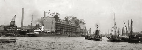 De Sint Jobshaven in nl:1913, foto van de Dienst Gemeentewerken Rotterdam